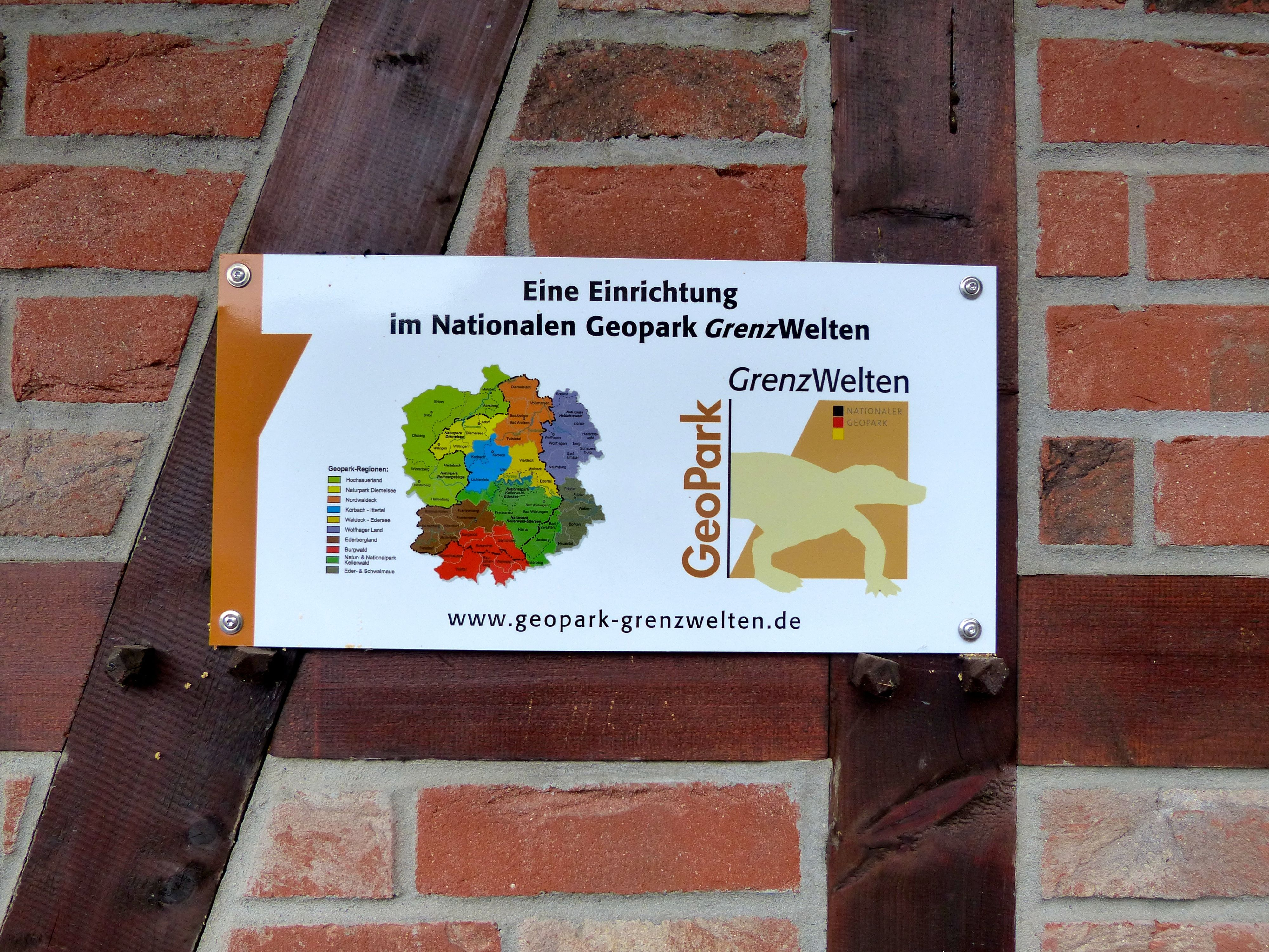 Geopark Grenzwelten: Station Kilianstollen (Marsberg)